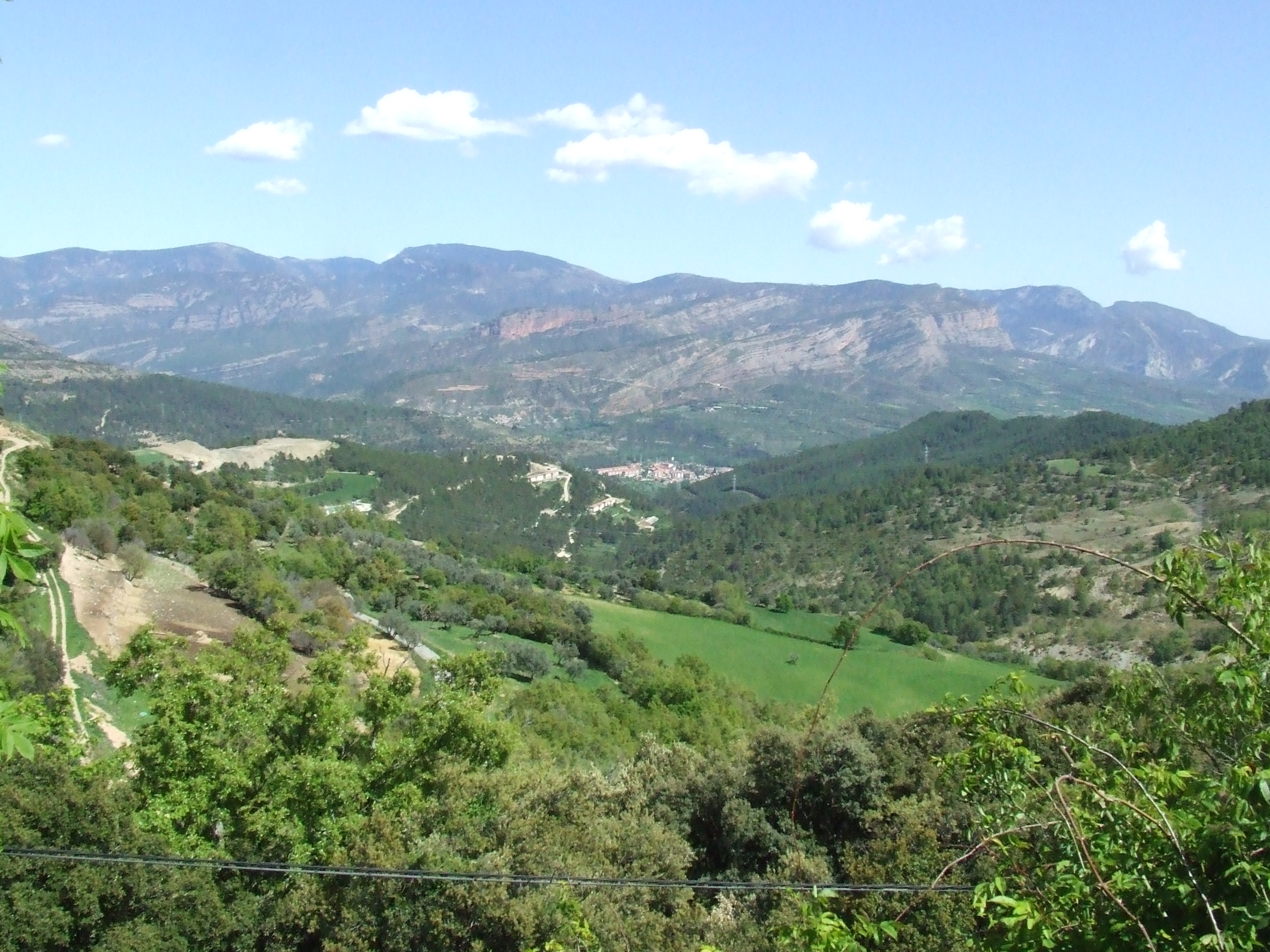 La vall del barranc de Mascarell des de Toralla (Toralla i Serradell, Conca de Dalt, Pallars Jussà)